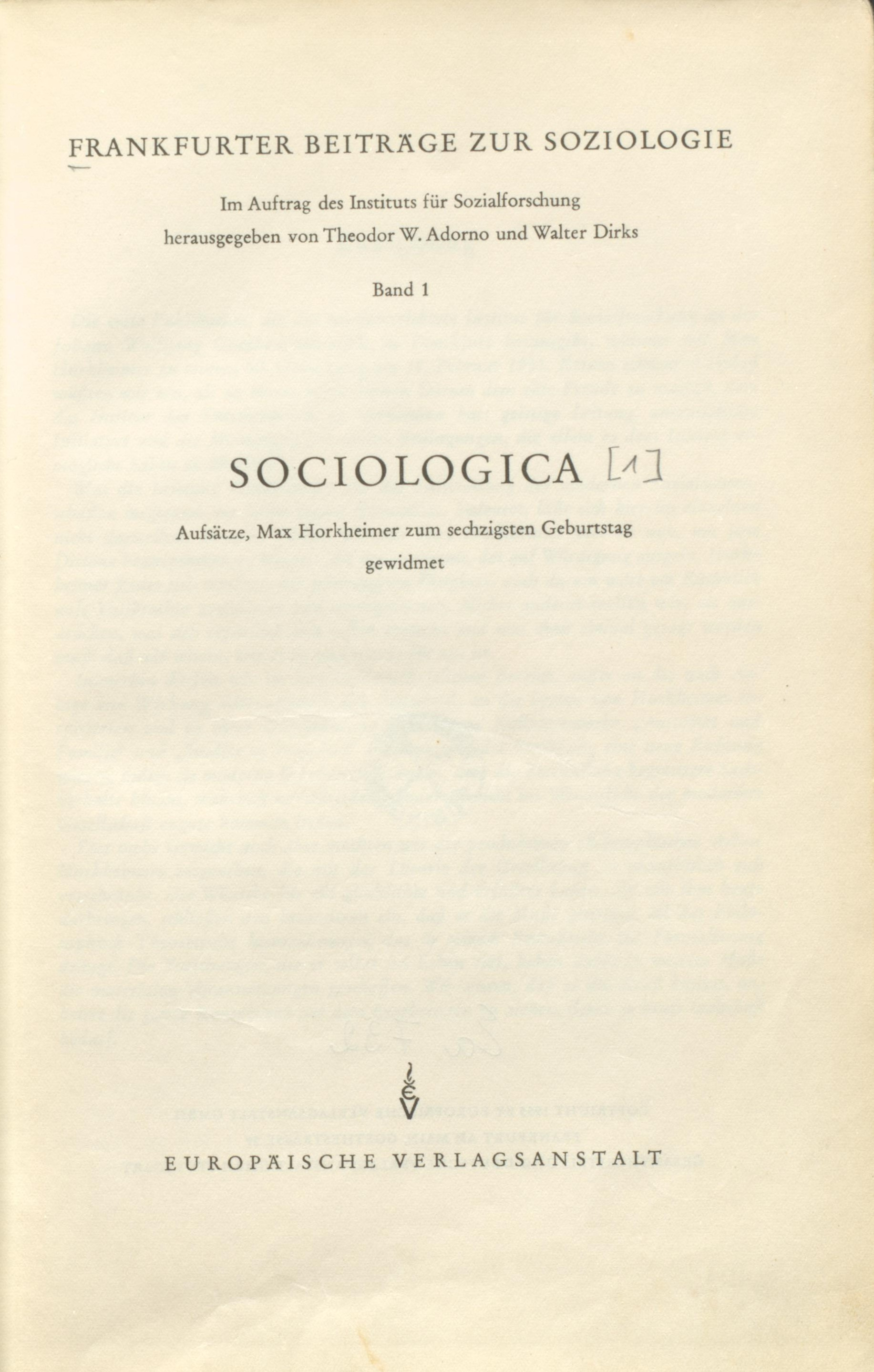 Institut für Sozialforschung Sociologica 1955 Titel